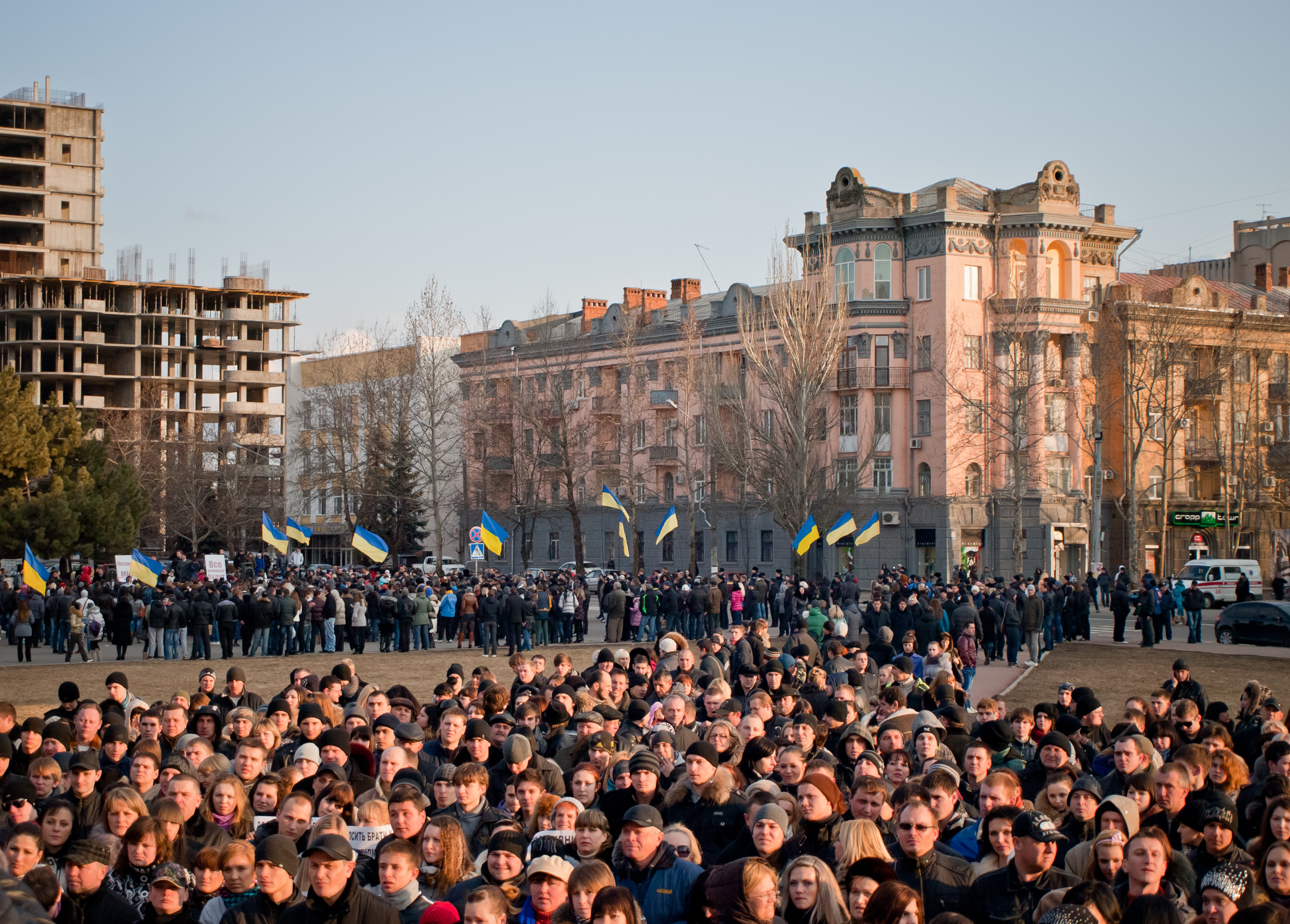 Акція протесту в підтримку Оксани Макар у Миколаєві